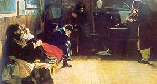 Ludwig van Beethoven